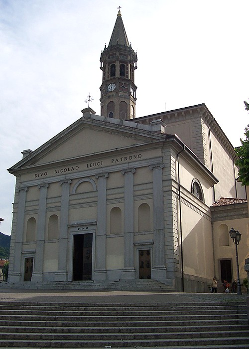 Lecco - Basilica di S. Nicolò